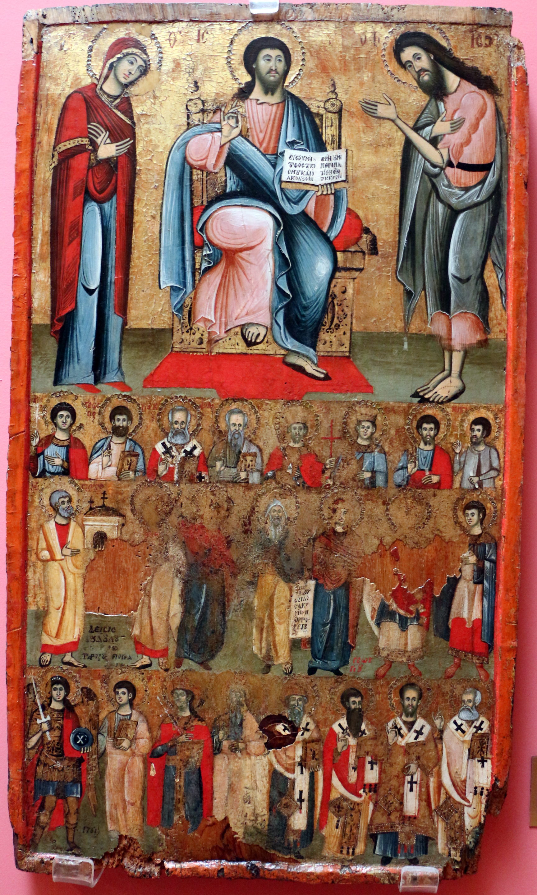 Muzeu Historik Kombëtar